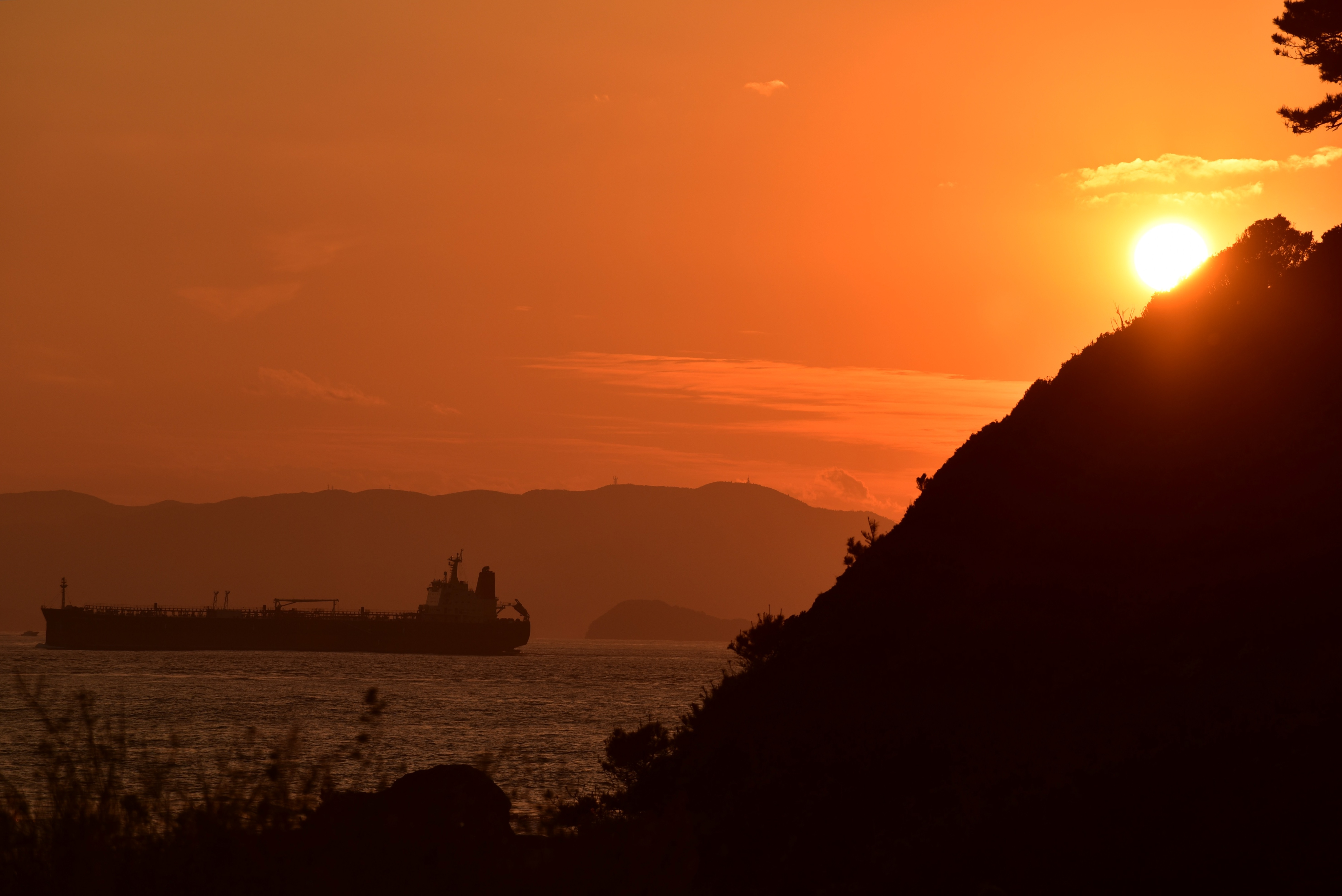 伊良湖岬の夕景 Nikon D750